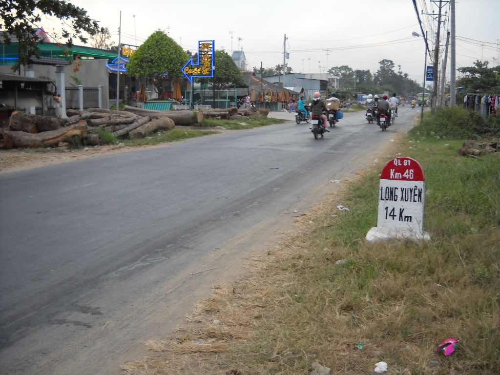 Thể loại:Quốc lộ Việt Nam